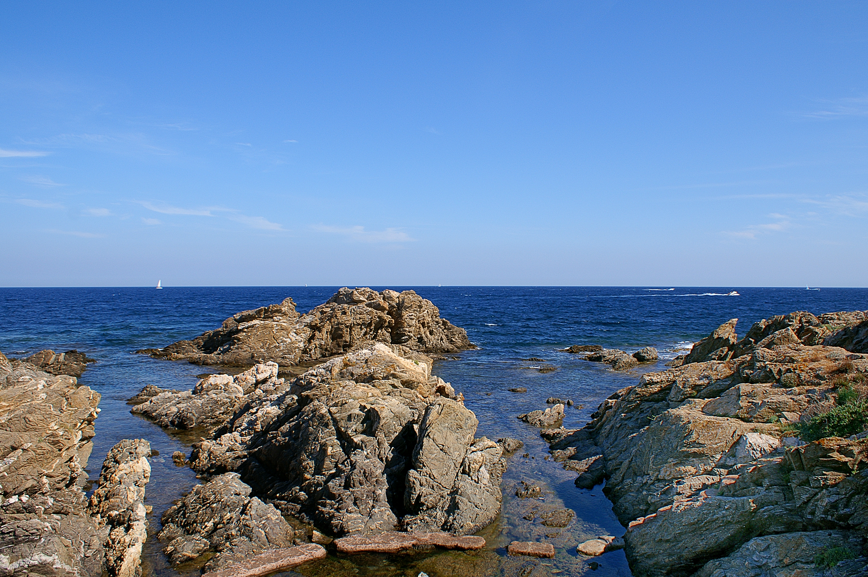 Un sentier littoral, parfois surnommé « sentier ou chemin des douaniers » en France, est un espace de déambulation piétonne en bordure du domaine maritime (mer ou océan). Généralement bien aménagés car à forte valeur touristique ajoutée, les sentiers littoraux permettaient souvent à l'origine d'assurer l'intégrité douanière du territoire, en réservant à l'État la gestion des frontières.